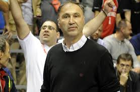 zufer Avdija en la actualidad como entrenador